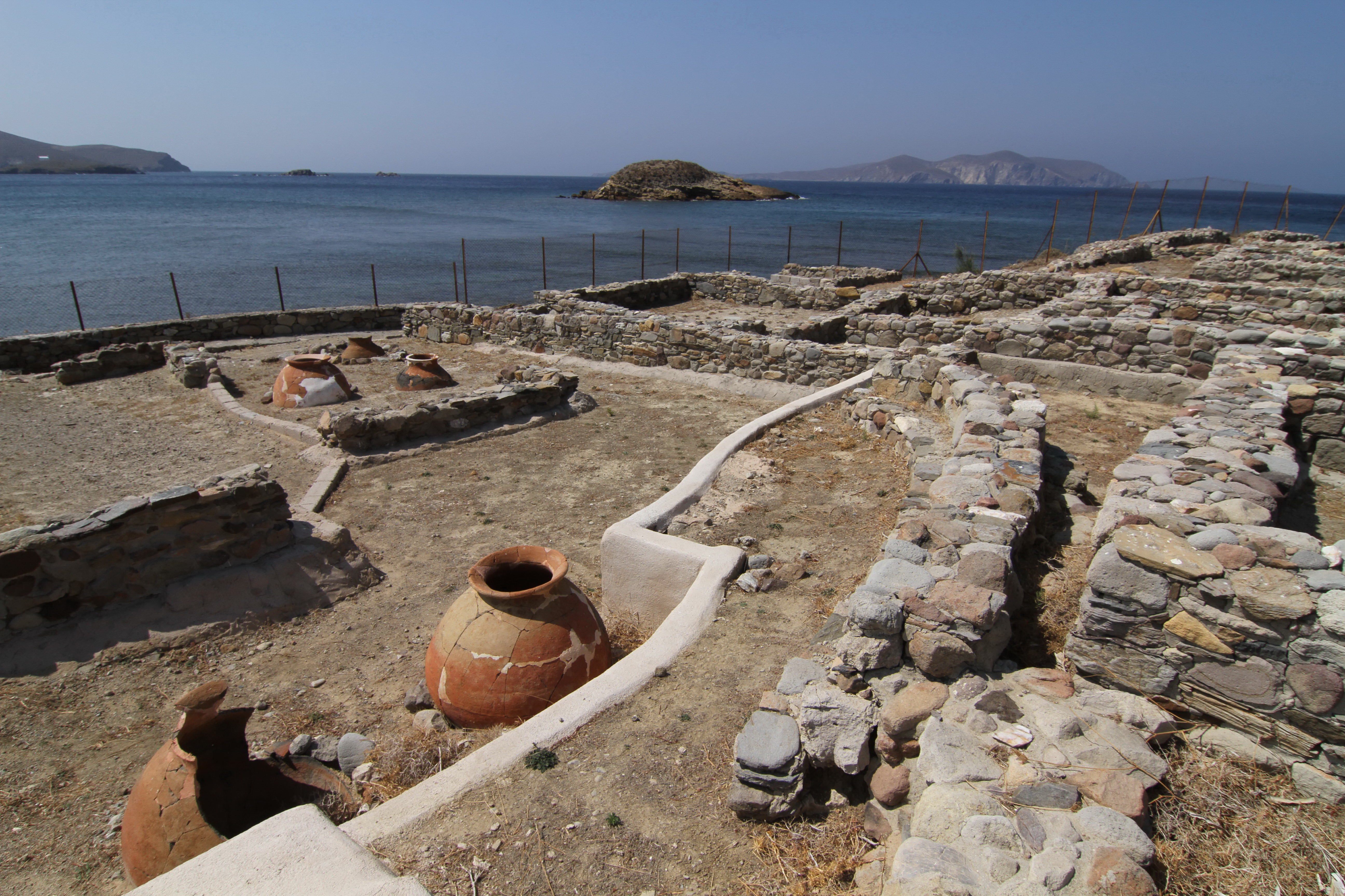 Αρχοντίκι στα Ψαρά«Αρχοντίκι στα Ψαρά»